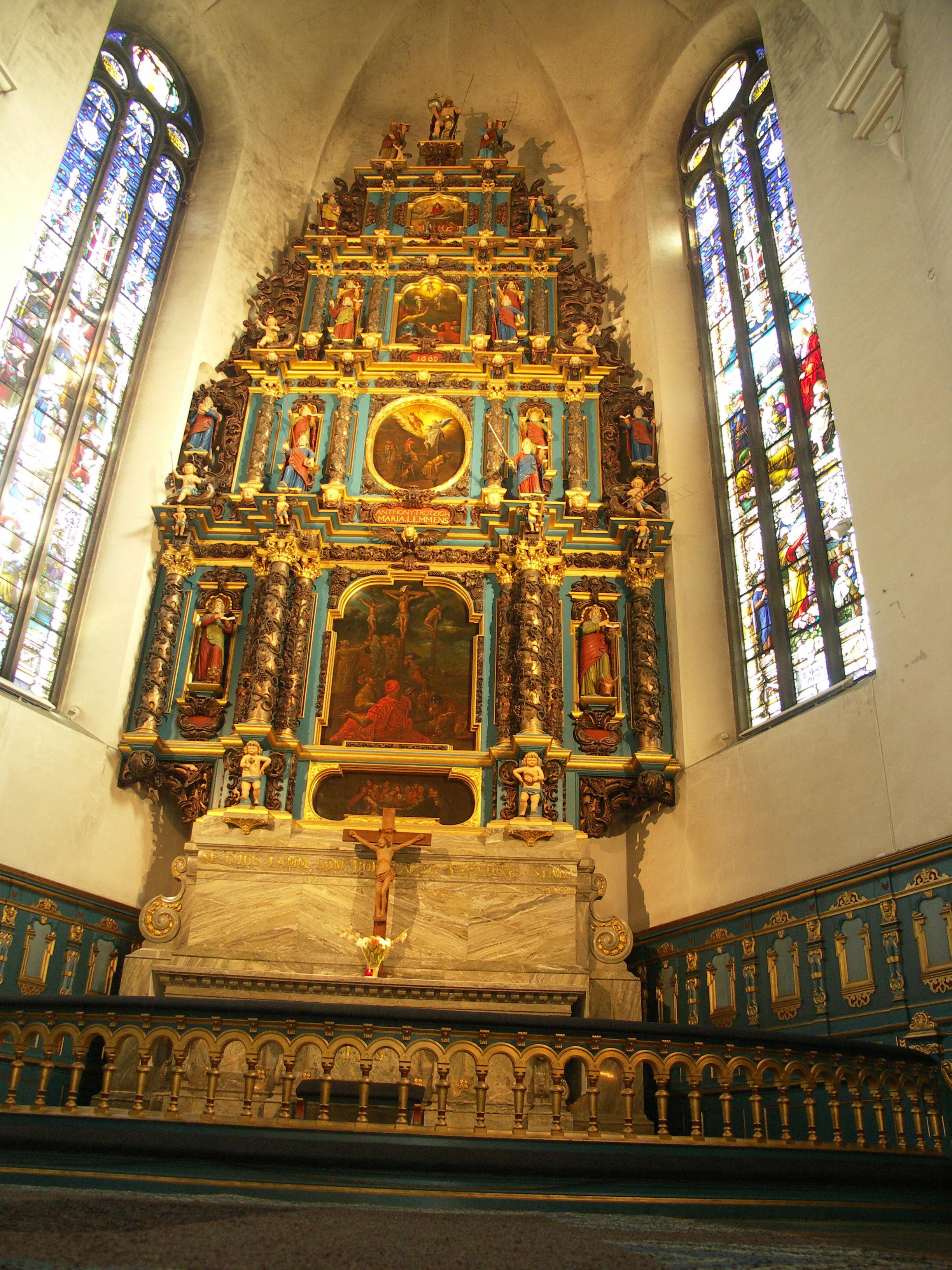 Kristine kyrka, Falun, Sverige.